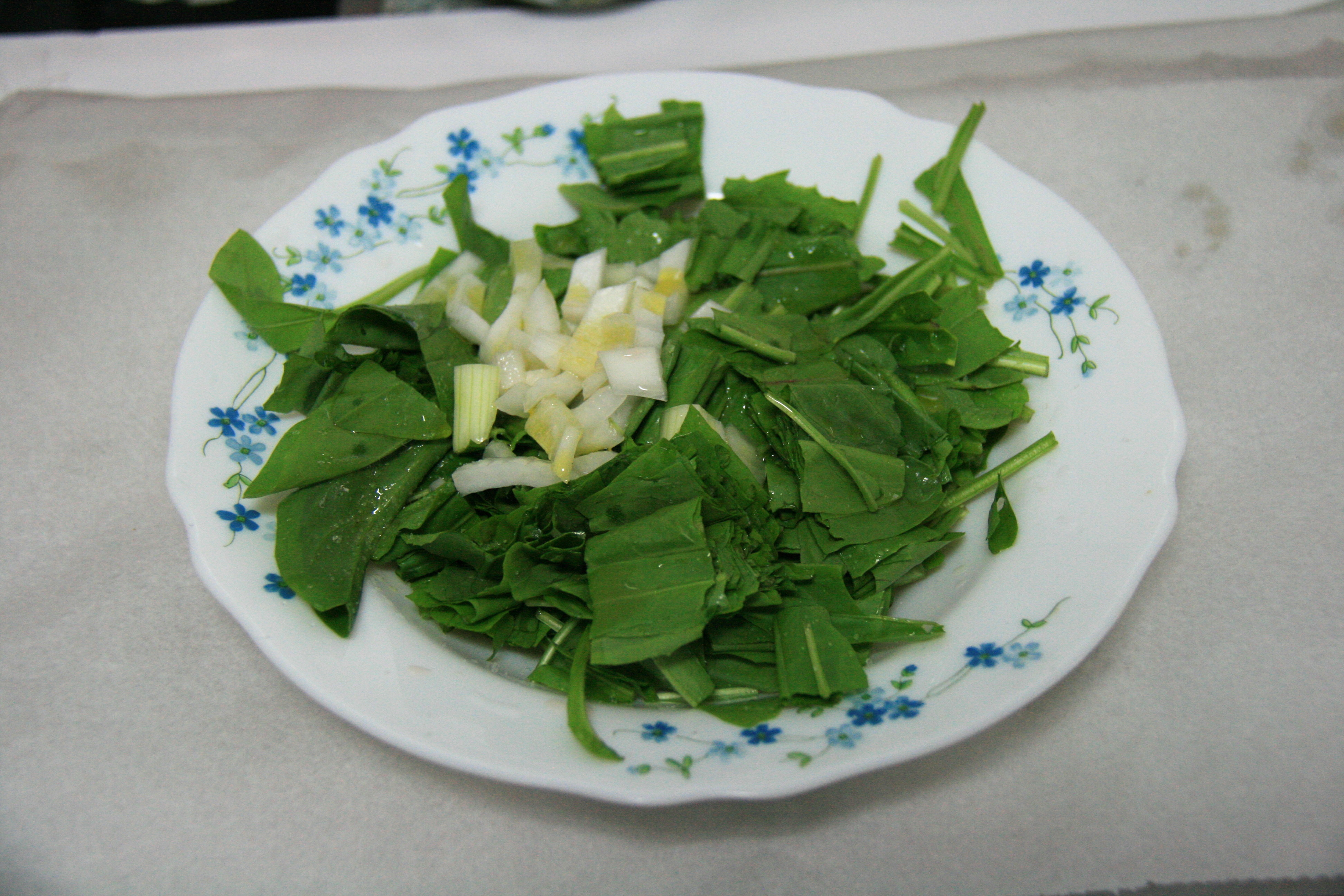 Salat von der Wegwarte